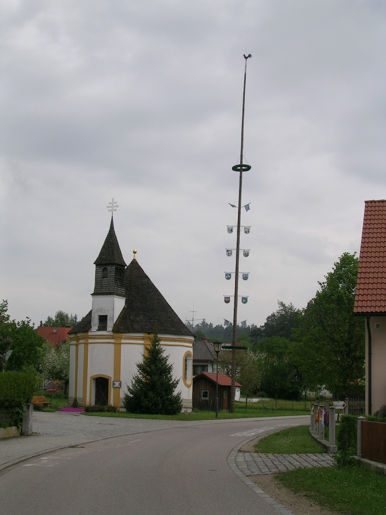 Katholische Filialkirche St. Bartholomäus in Flitzing (Gemeinde Zolling) This is a photograph of an architectural monument.